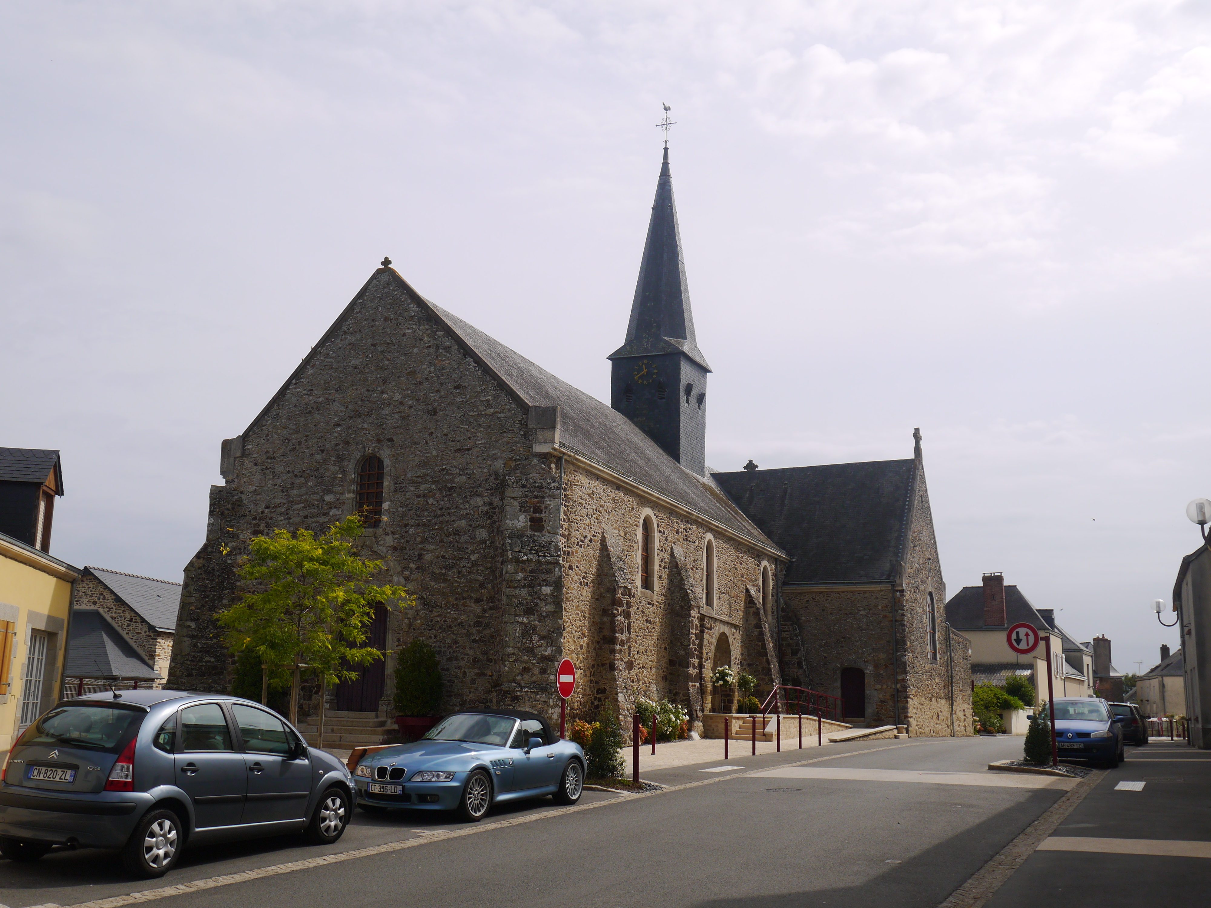 L'église Saint-Etienne.